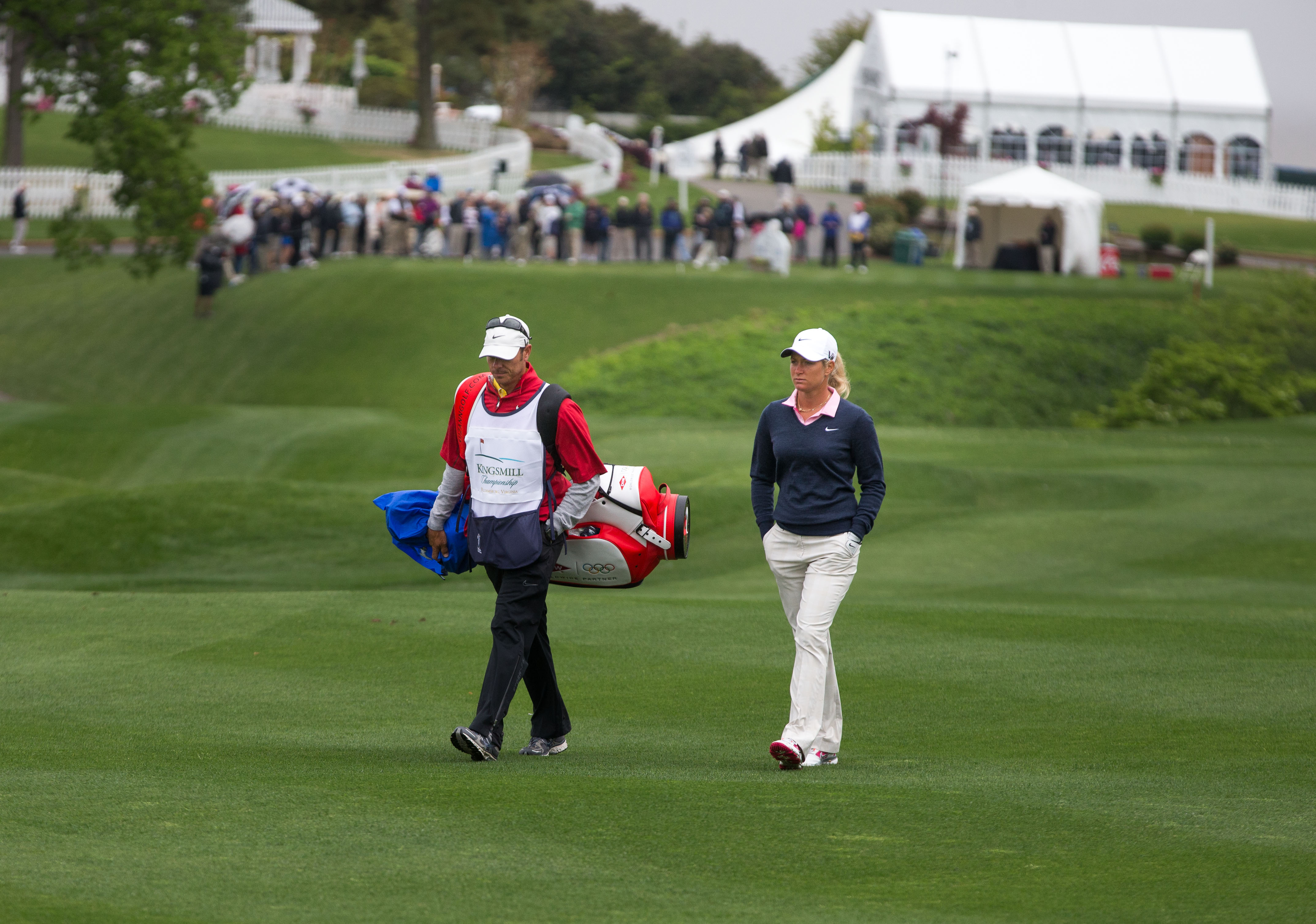 LPGA Kingsmill May 1, 2013